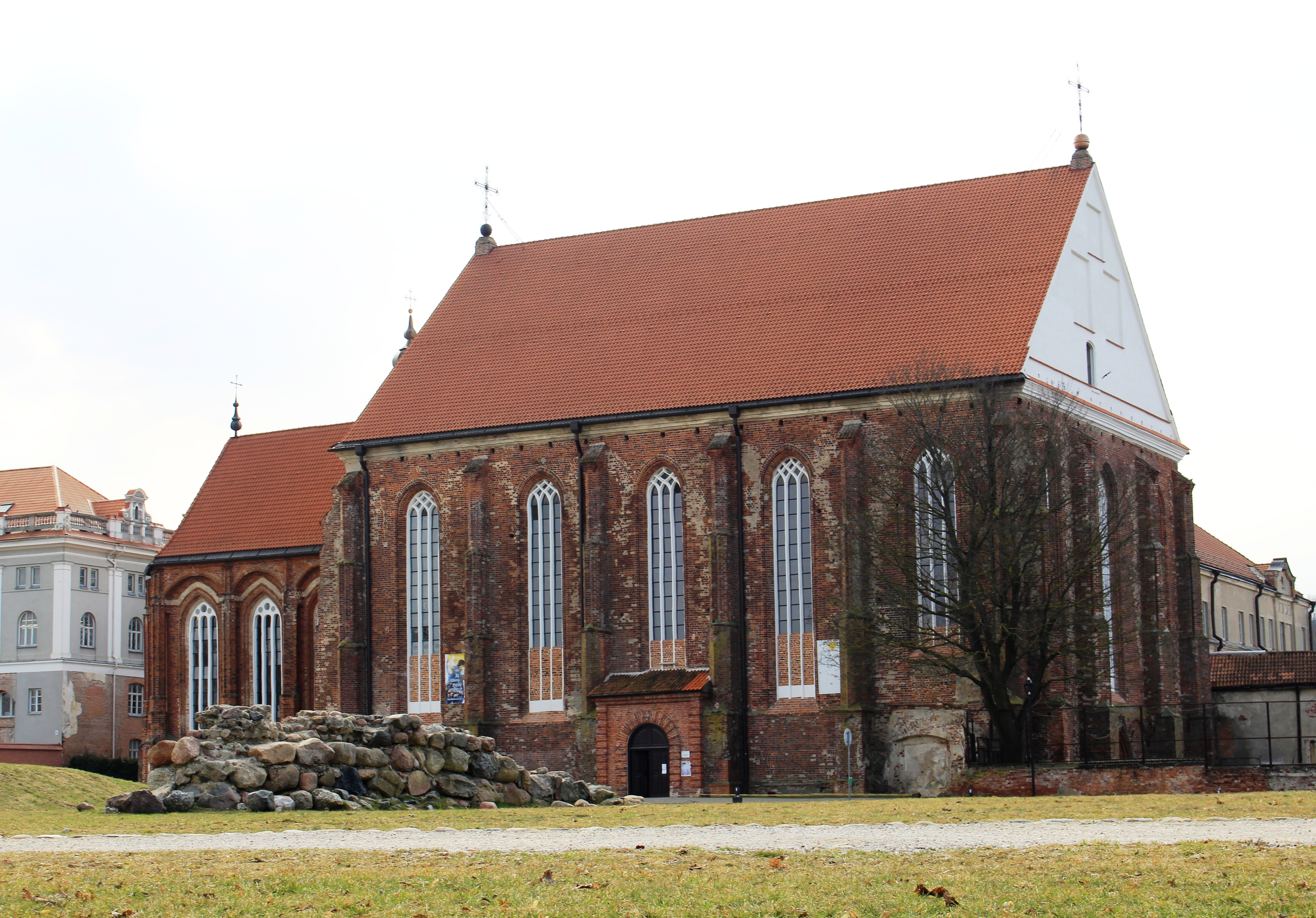 Kauno Šv. Jurgio kankinio bažnyčia